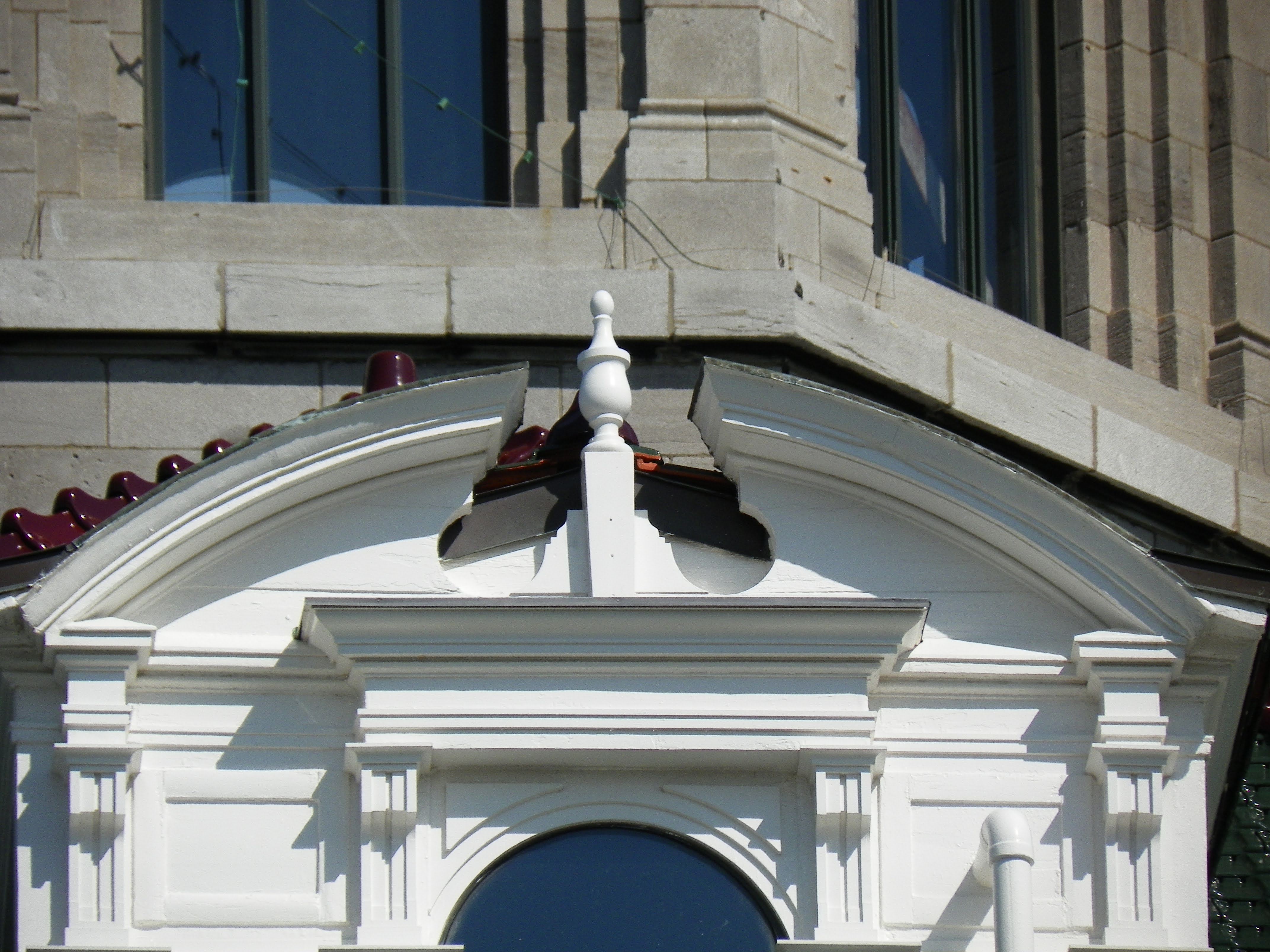 Détail d'un linteau, marché Maisonneuve